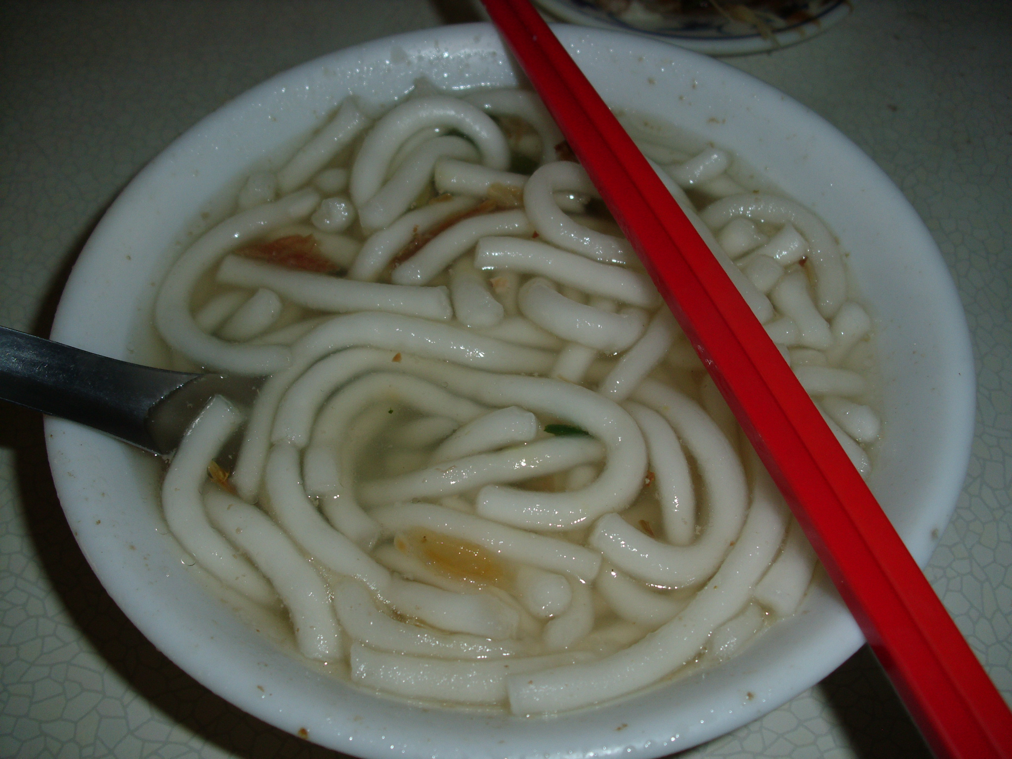 Bân-lâm-gú: 米篩目，佇員林王爺宮後遐翕的。